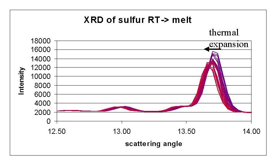 synchrotron XRD zwavel tijdens opwarmen